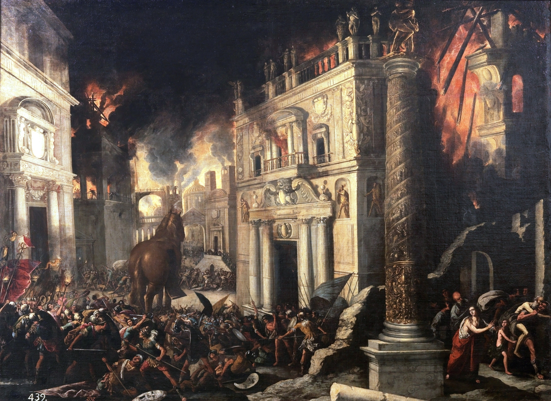 La obra representa el mítico incendio de la ciudad de Troya, situada en la actual Turquía y descrito por Homero en La Ilíada.